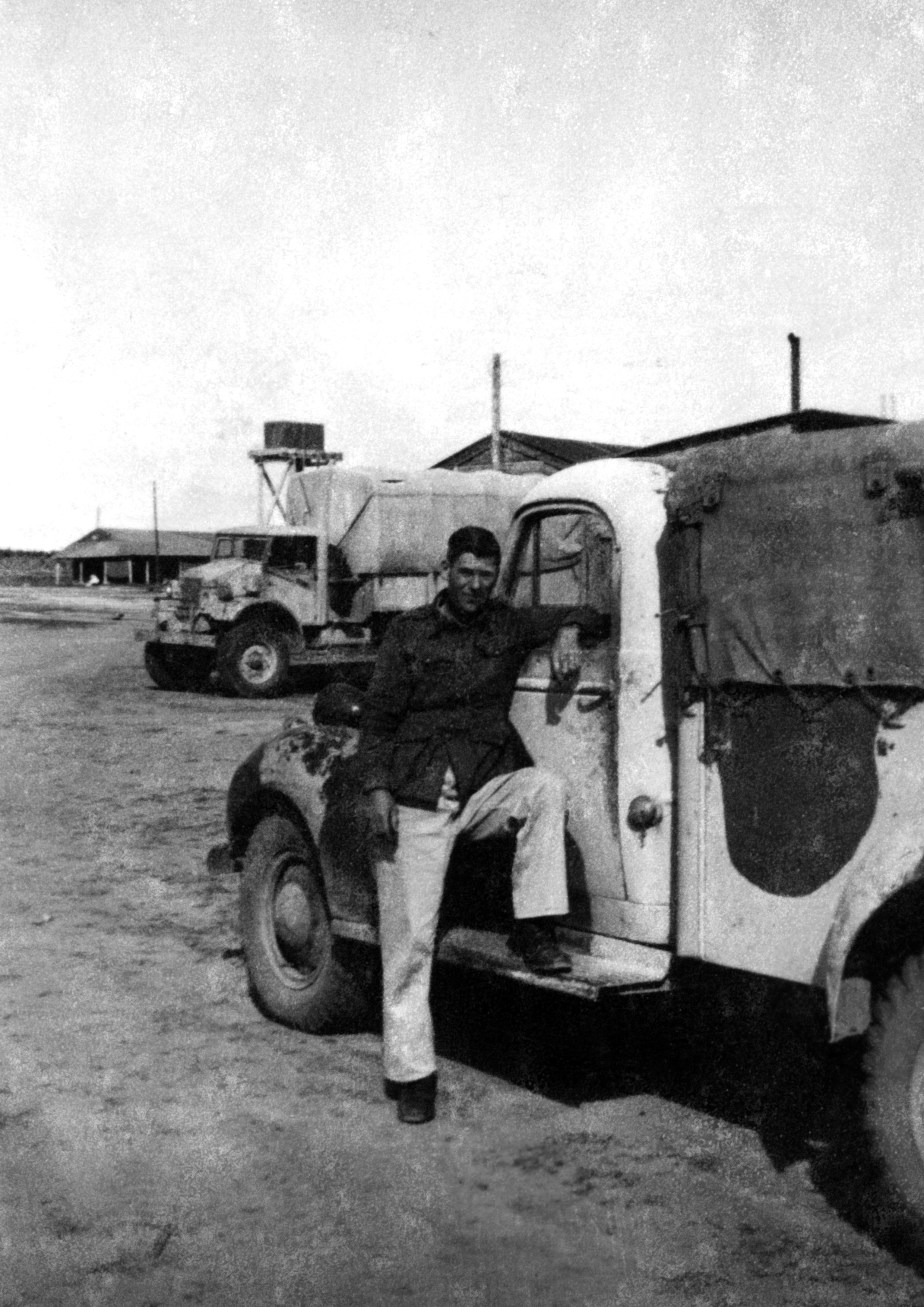 Taken Dec 1942 by Dvr Tom Beazley